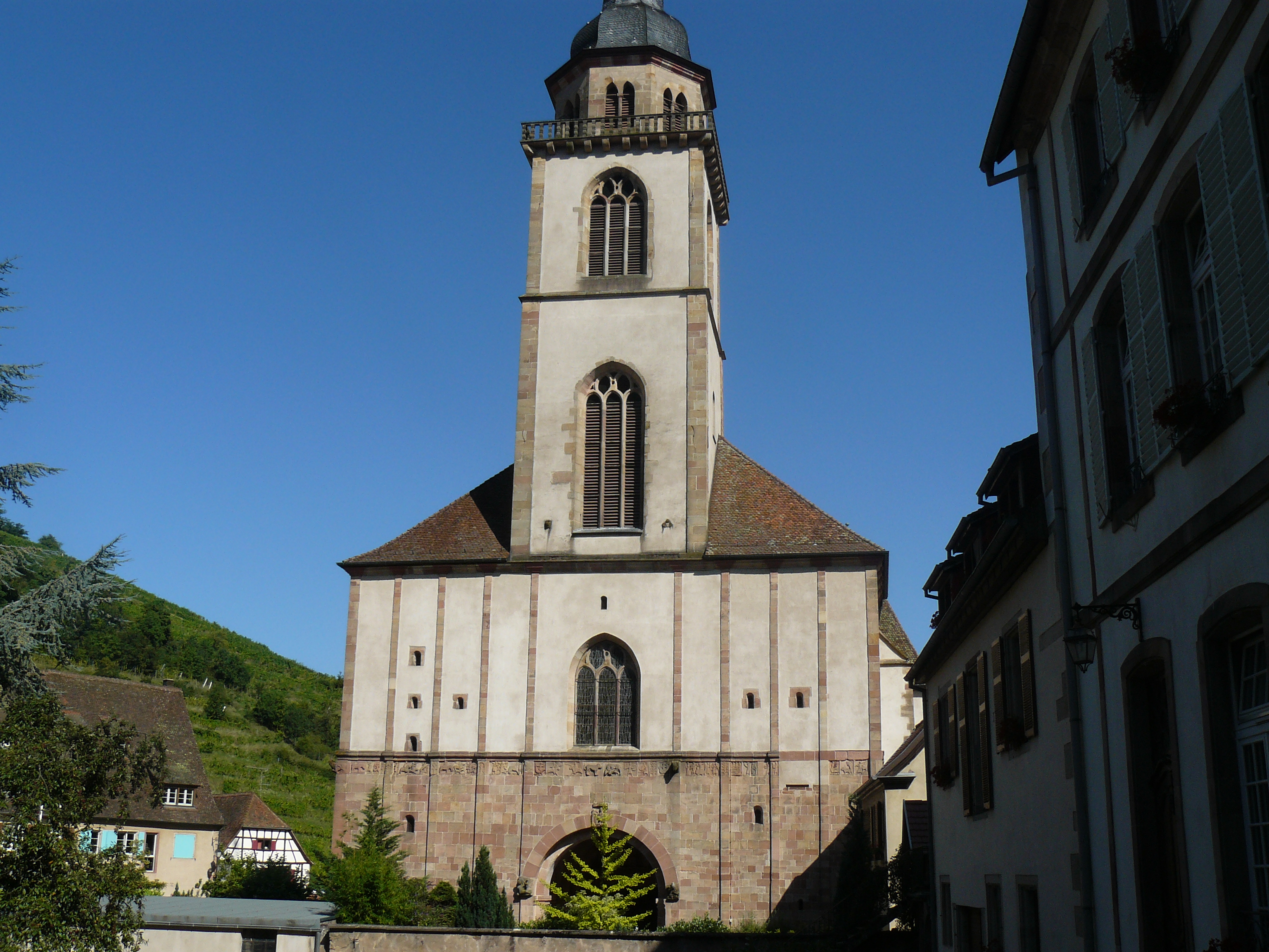 Église Saint-Pierre-et-Saint-Paul (XIe-XVIIIe siècles)